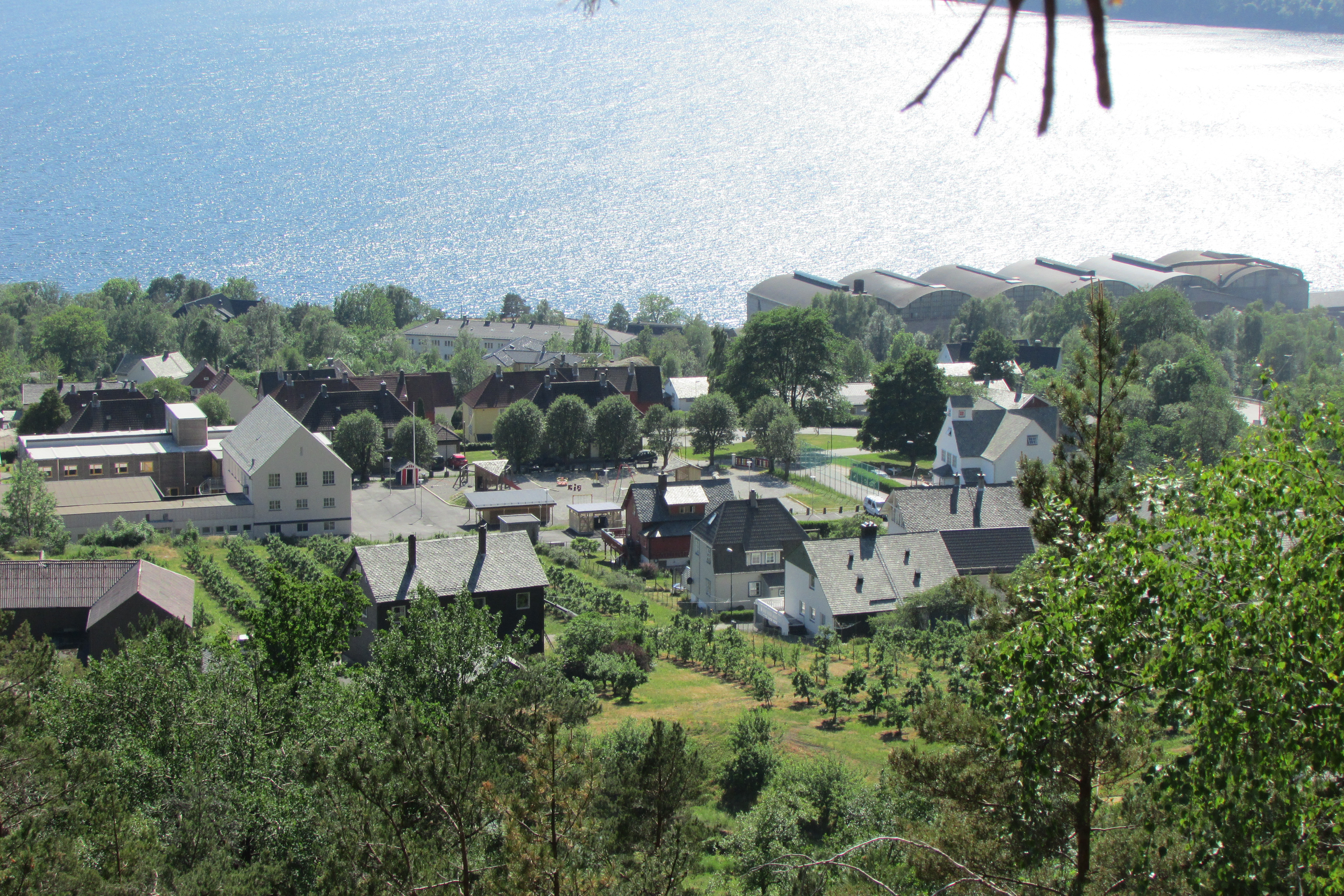 Ålvik, Kvam